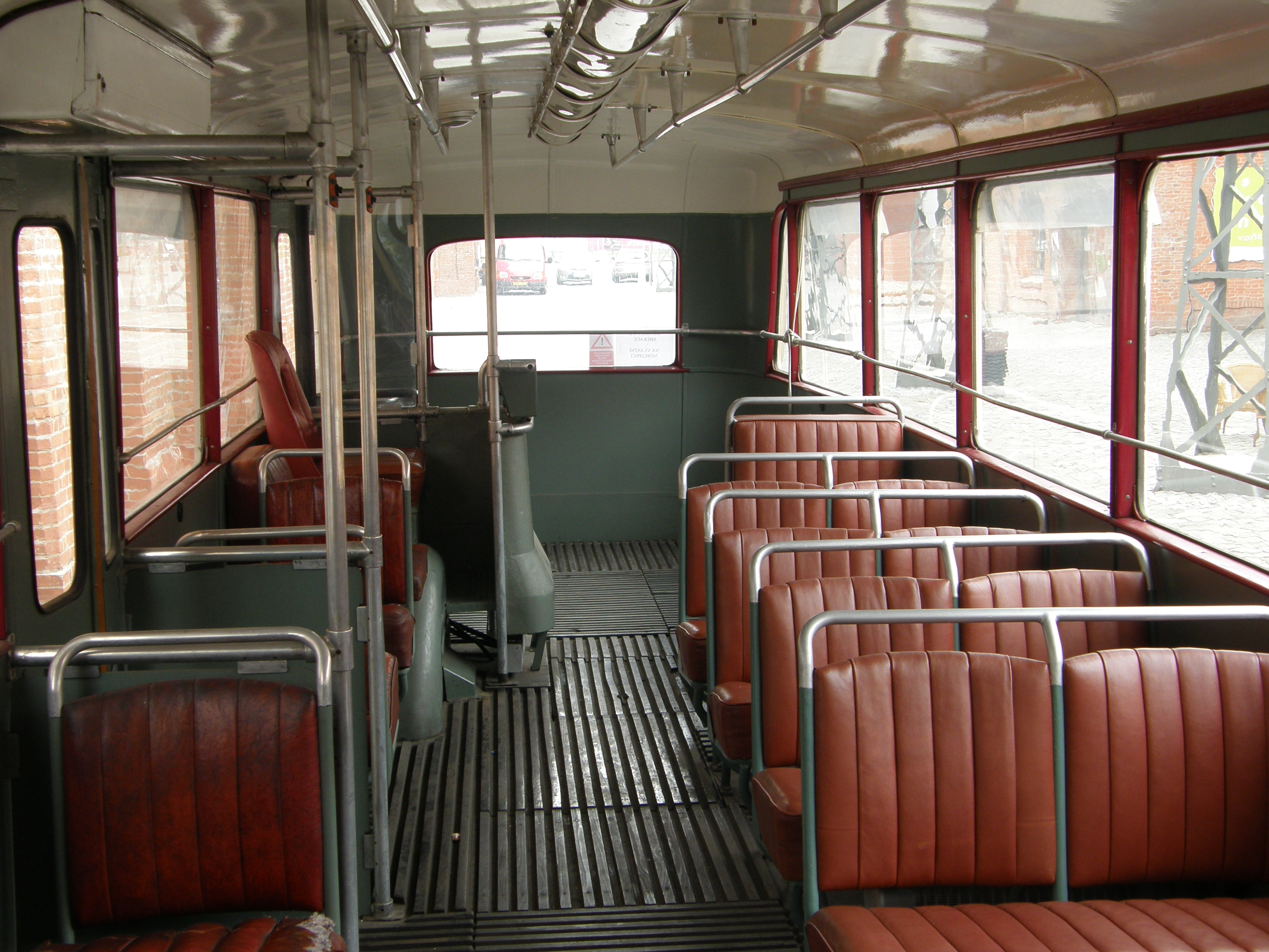 Škoda 6Tr (e.č. 135) u Vaňkovky v rámci výstavy "140 let MHD v Brně".